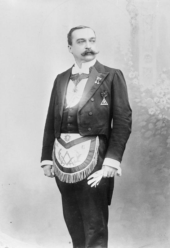 Gérard de la Valette in vrijmetselaarskledij. Bestuursambtenaar in Nederlands-Indië en zwager van Louis Couperus